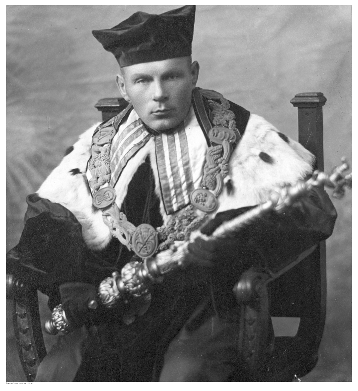 Фотография на Станислав Пигон, полски литературовед.